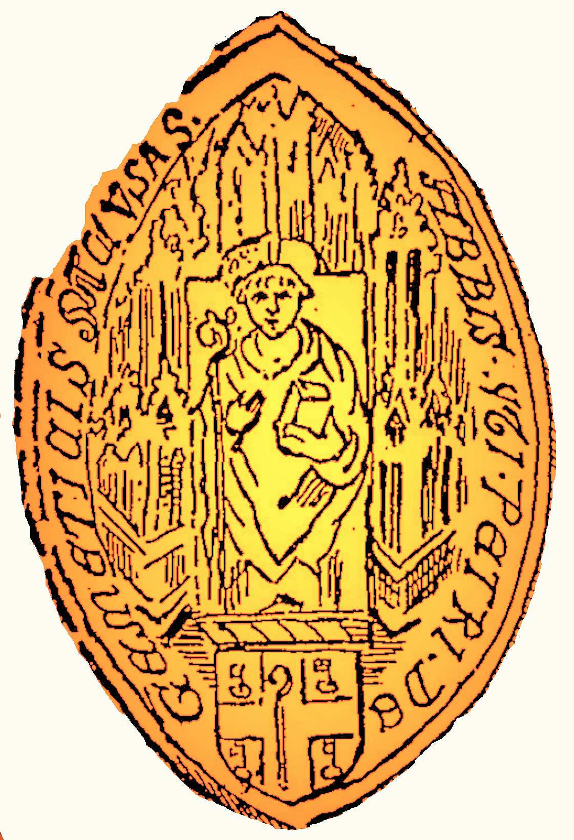 Abbaye de Jumieges, Sceau de l'abbé Simon Du Bosc, 1417 (Image du domaine public modifiée (Recueil des publications de la société havraise, 1872, page:370)